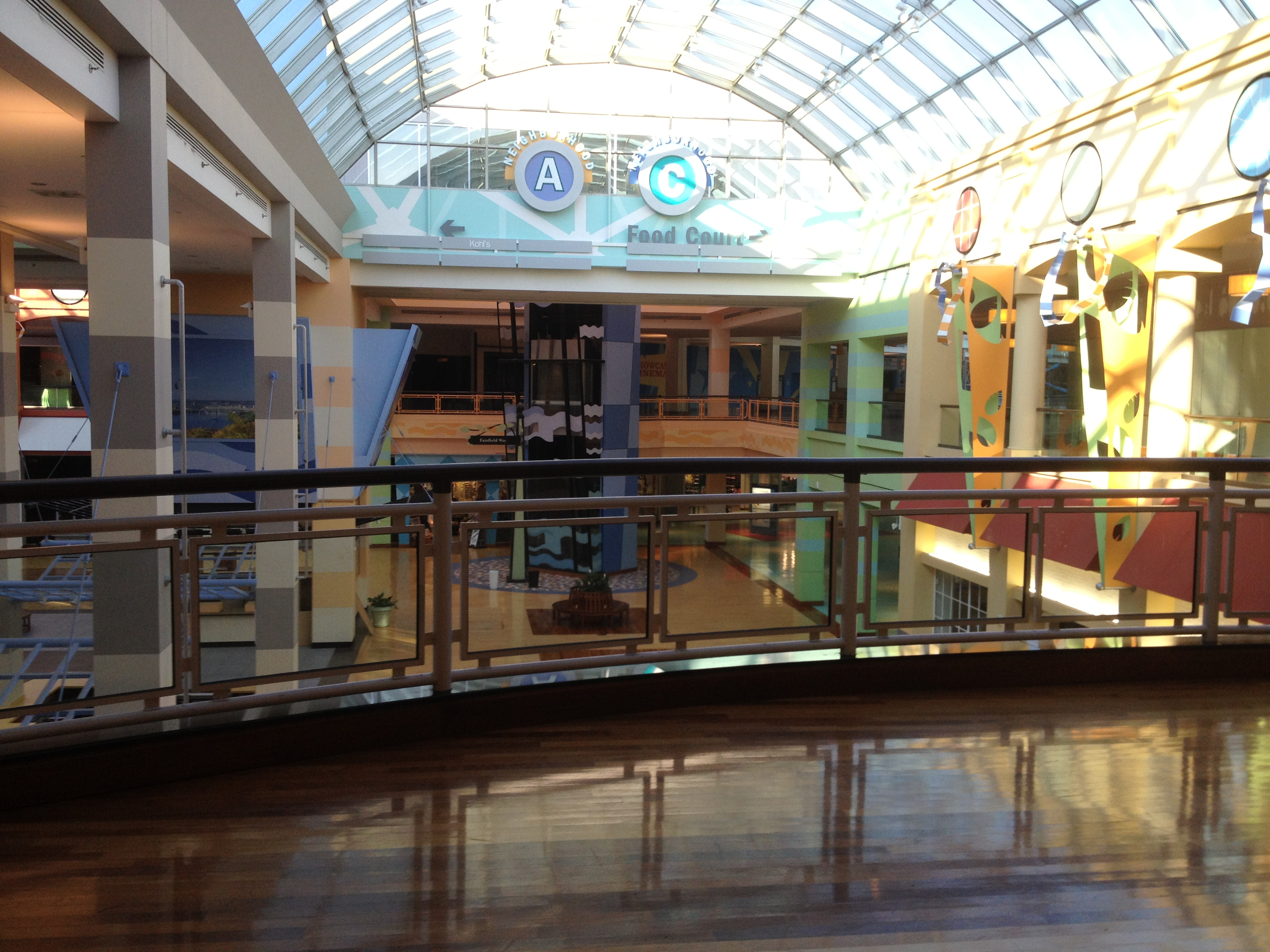 Cincinnati Mills Mall